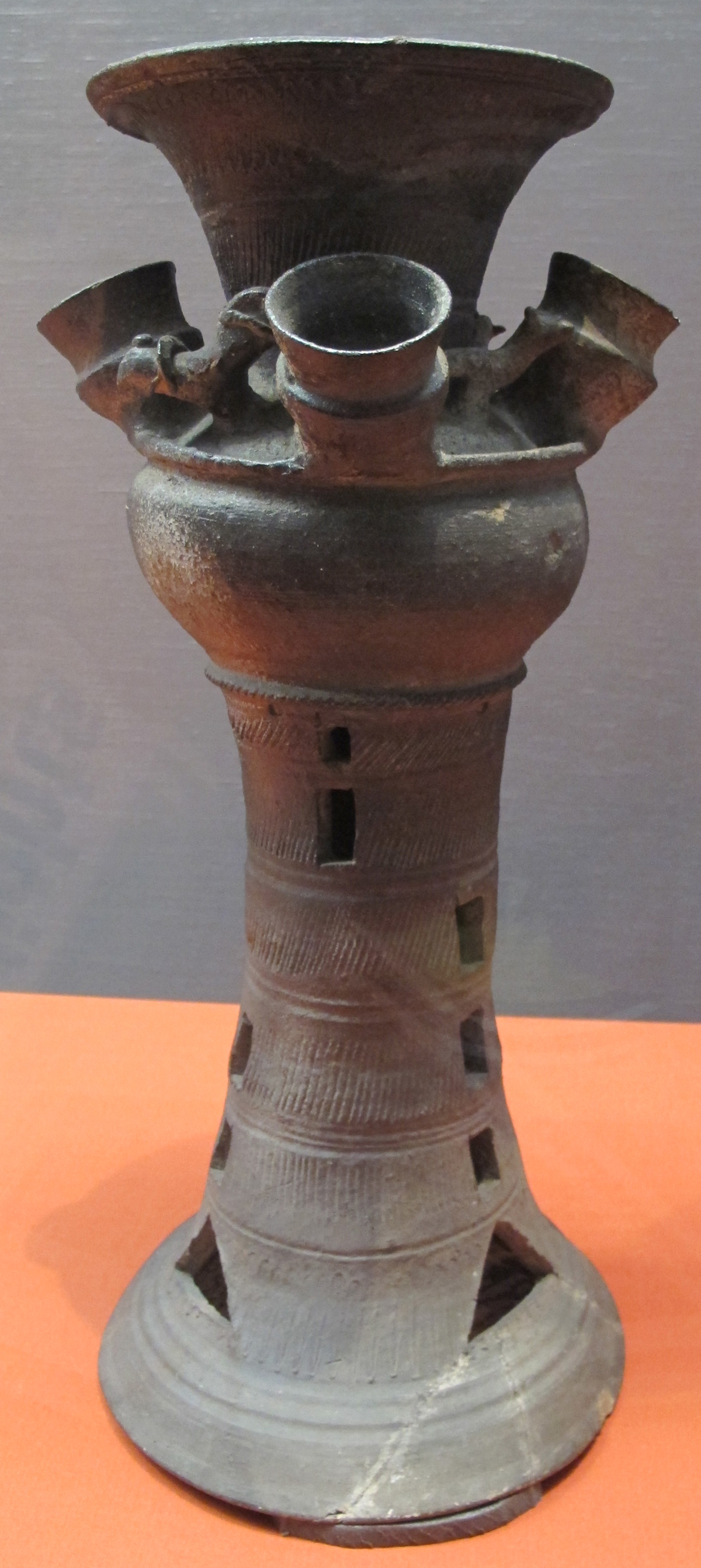 Periodo kofun, giara con piede, decorazioni e diminuzioni, VI sec.